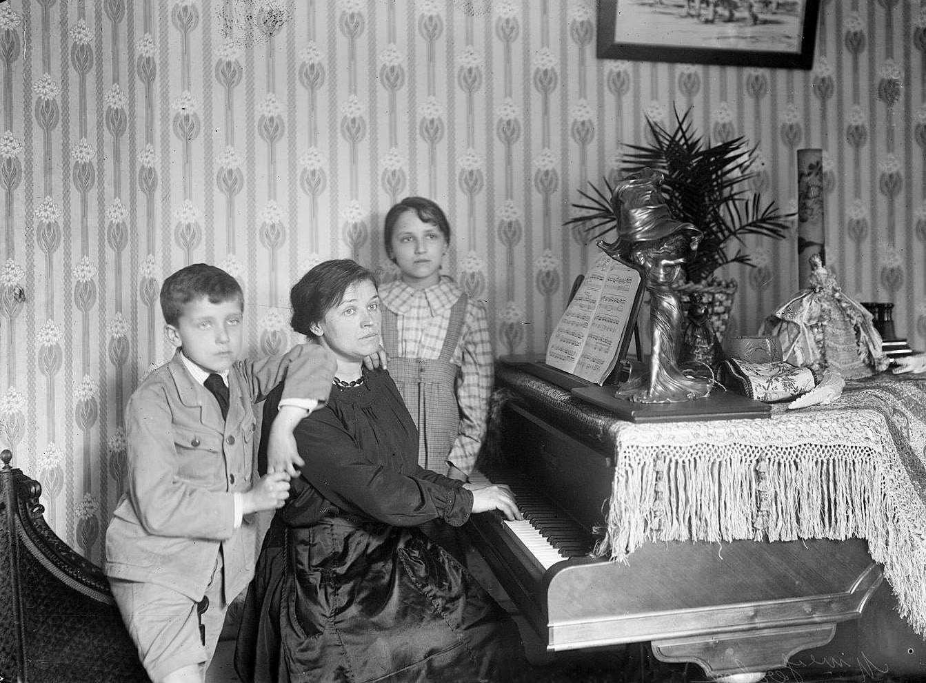 Madame Verlot [l'épouse du commandant Constant Verlot au piano, avec ses enfants]. Bibliothèque nationale de France, département Estampes et photographie